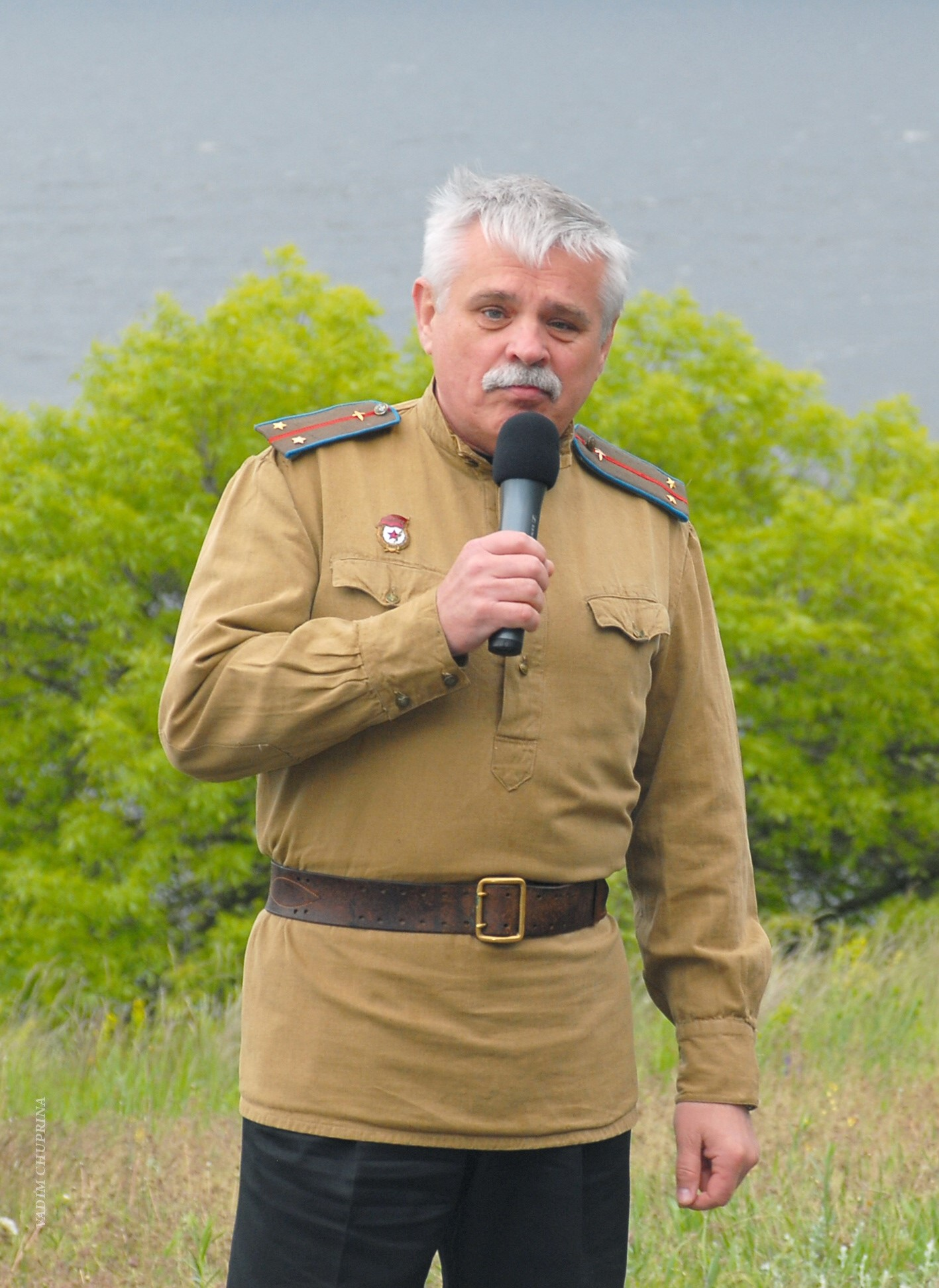 НЕМЧЕНКО АЛЕКСАНДР ДМИТРИЕВИЧ , фото Чуприна Вадим